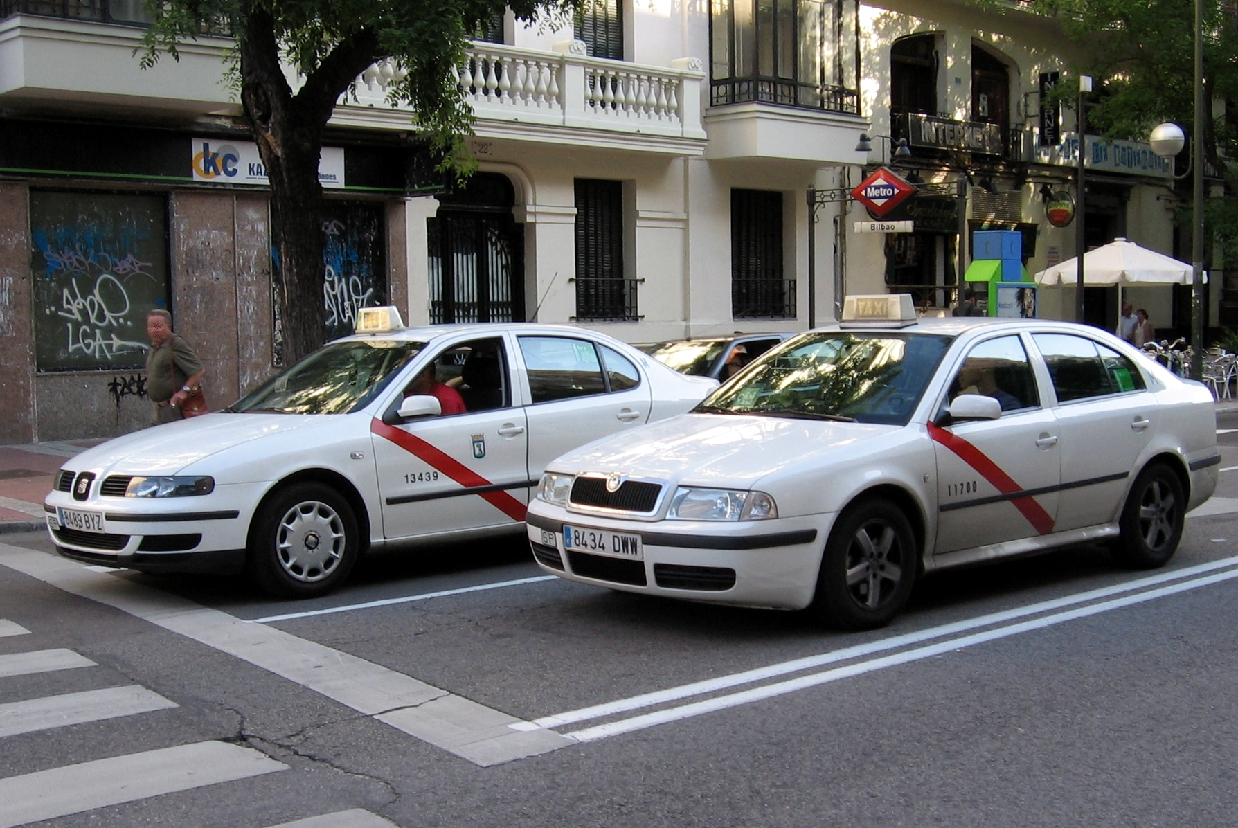 Madrid taxis